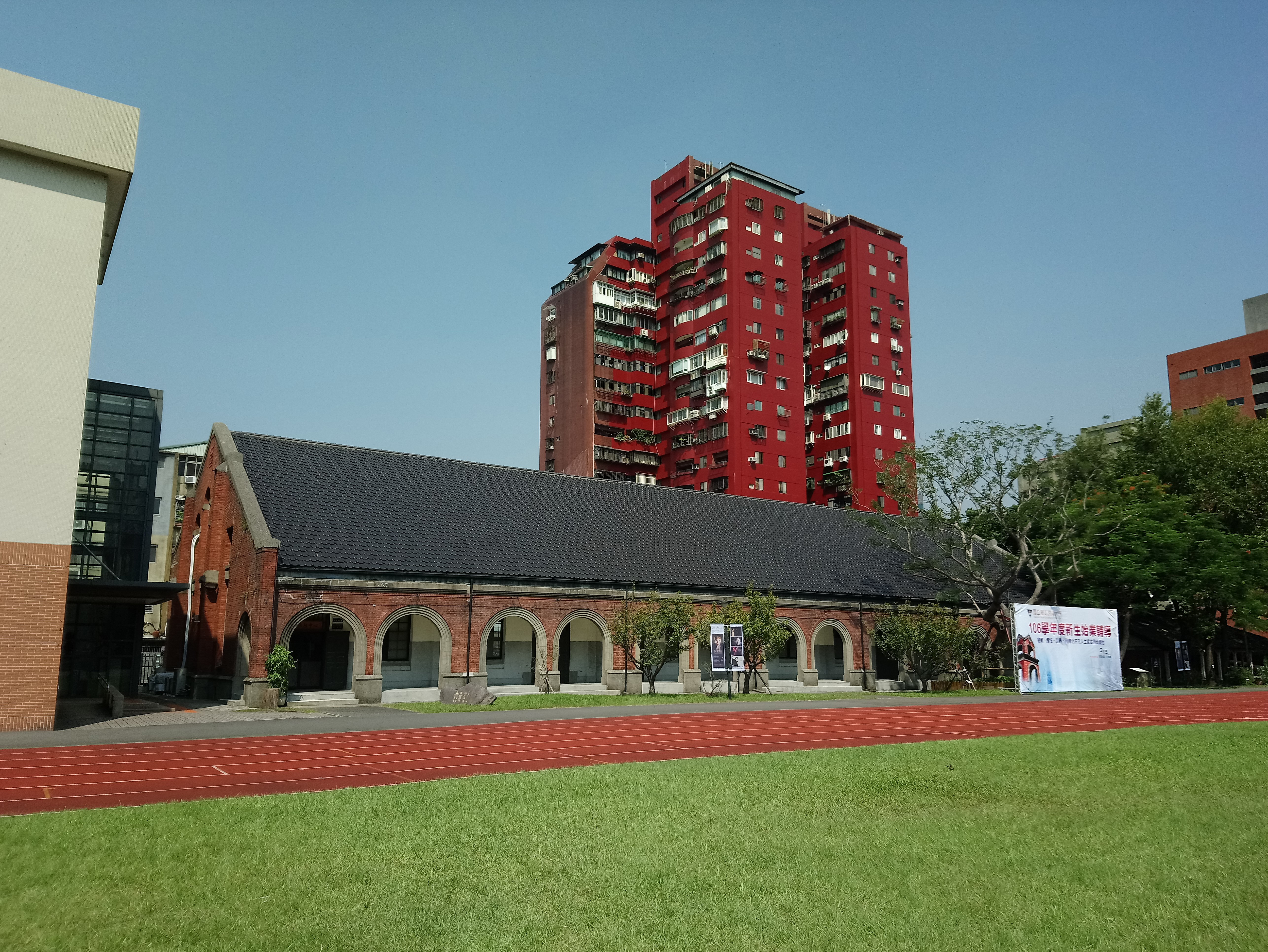 舊總督府第二師範學校大禮堂,臺北市大安區大安區臥龍次分區臥龍里